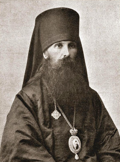 Епископ Михаил (в миру Михаил Михайлович Грибановский; 2 (14) ноября 1856, Елатьма, Тамбовская губерния — 19 (31) августа 1898, Крым) — епископ Таврический и Симферопольский. Богослов.